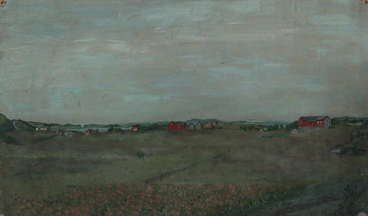 Victor Ronanders fremstilling av Røkkegårdene på Skatval. Lerretsmaleri, 39 x 23,5 cm.